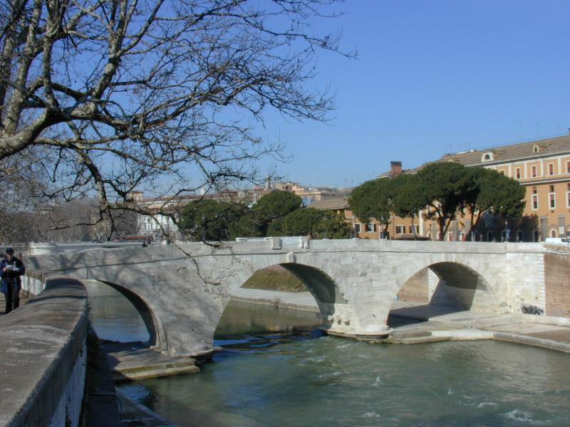 Roma, Ponte Cestio